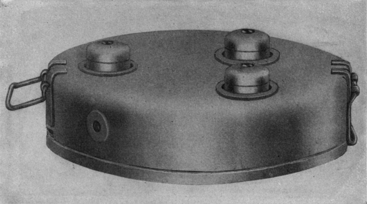 A German Tellermine 29 anti-tank mine